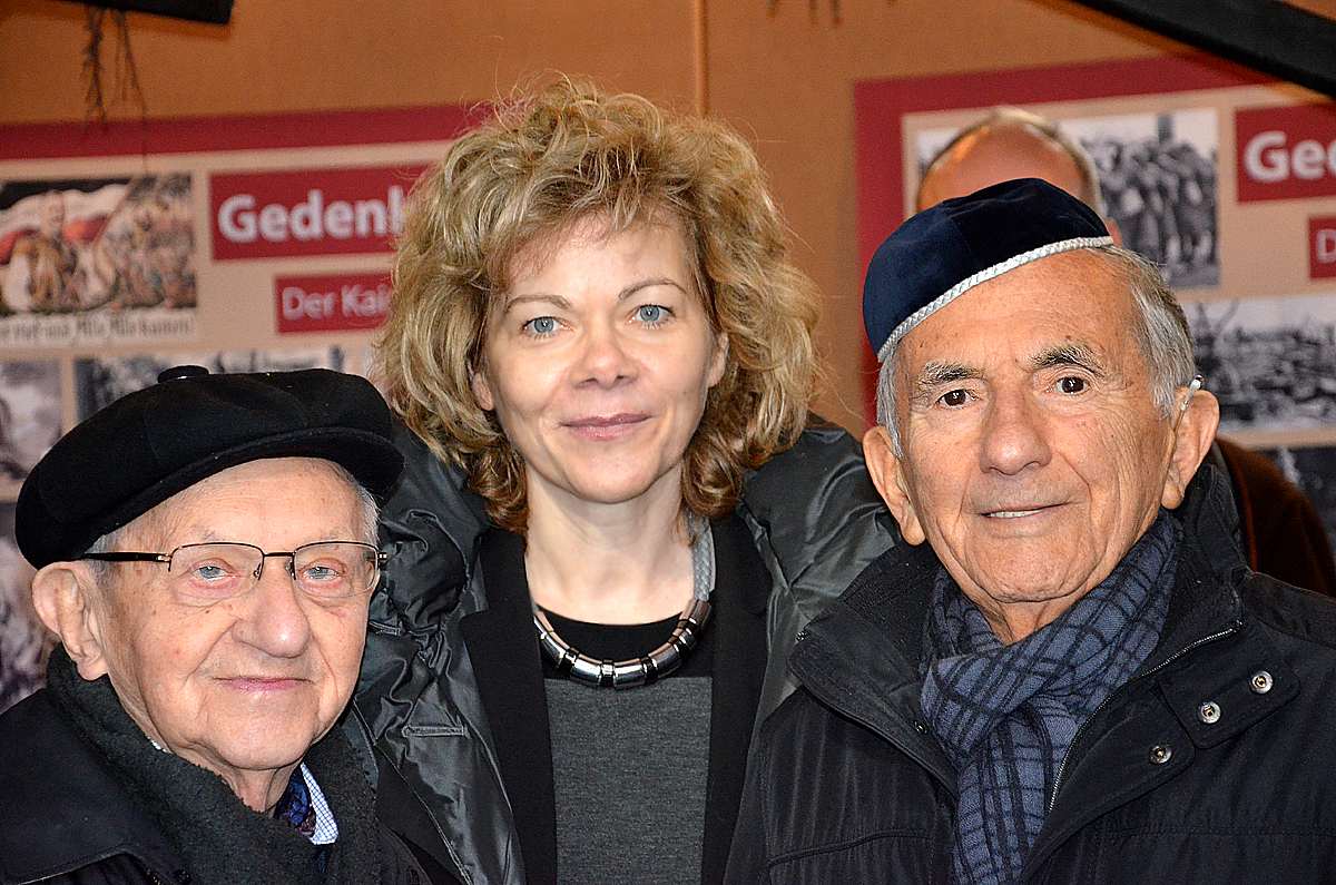 Bei der Eröffnung der Ausstellung Zeit zum Erinnern, die als Erlebnis- und Gedächtnisausstellung zum Gedenken an den Ersten Weltkrieg (1914-1918) konzipierte Wanderausstellung, hier nun in der von Edwin Oppler errichteten Predigthalle auf dem Jüdischen Friedhof An der Strangriede in der Nordstadt von Hannover: Die Projektkünstlerin Corinna Luedtke mit den Holocaust-Überlebenden Henry Corman (links) und Salomon Finkelstein ...